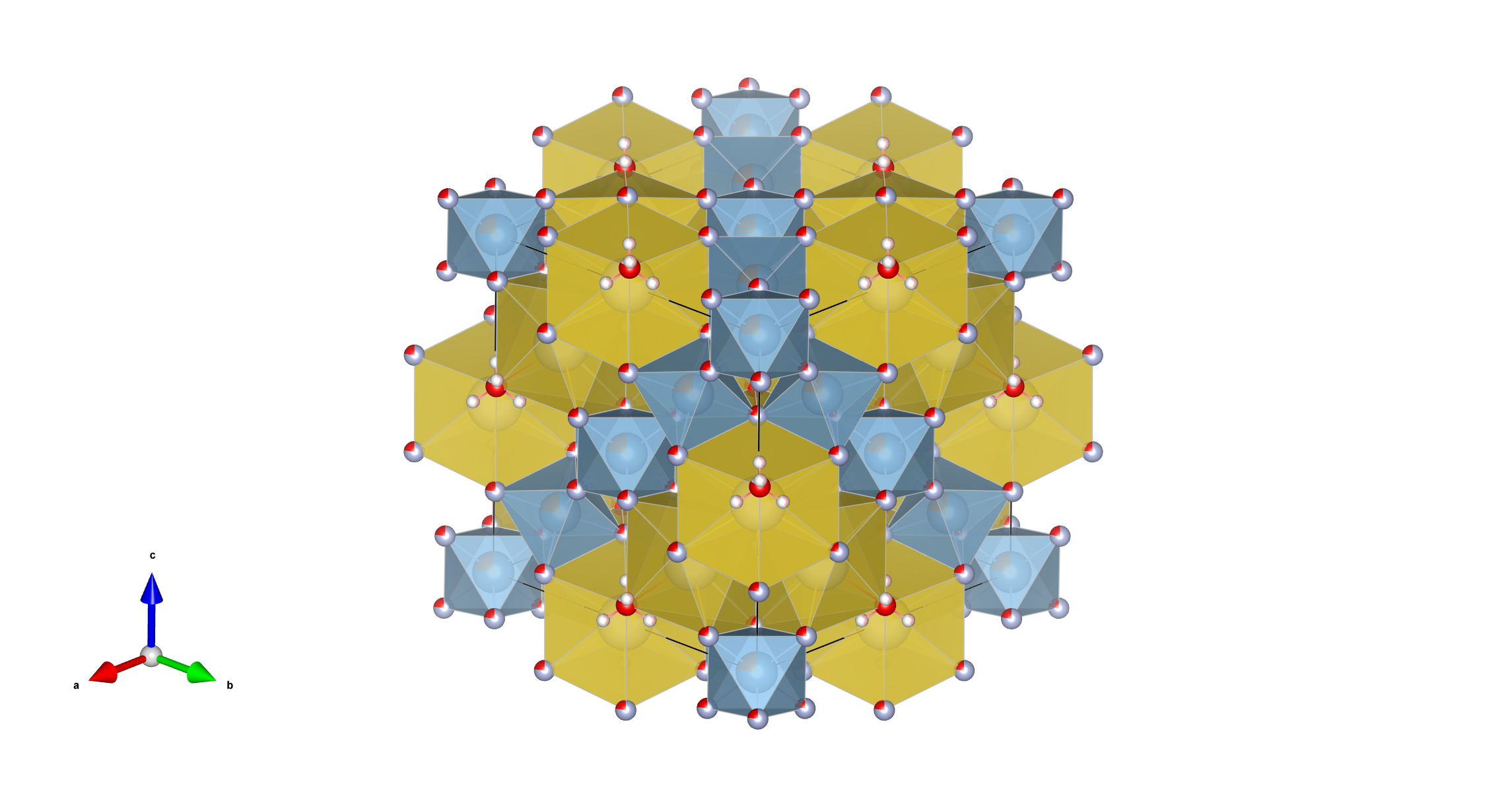 Kristallstuktur von Hydrokenoralstonit (Ralstonit) als „Polyeder-Modell“. Erstellt mithilfe des freien Strukturprogramms VESTA und den CIF-Daten von Herta Effenberger und Friedrich Kluger Farblegende: BO6-Oktaeder: blau; AO8-Polyeder: grünlichgelb; Fluor: hellviolett; Sauerstoff: rot; Wasserstoff: rosa.